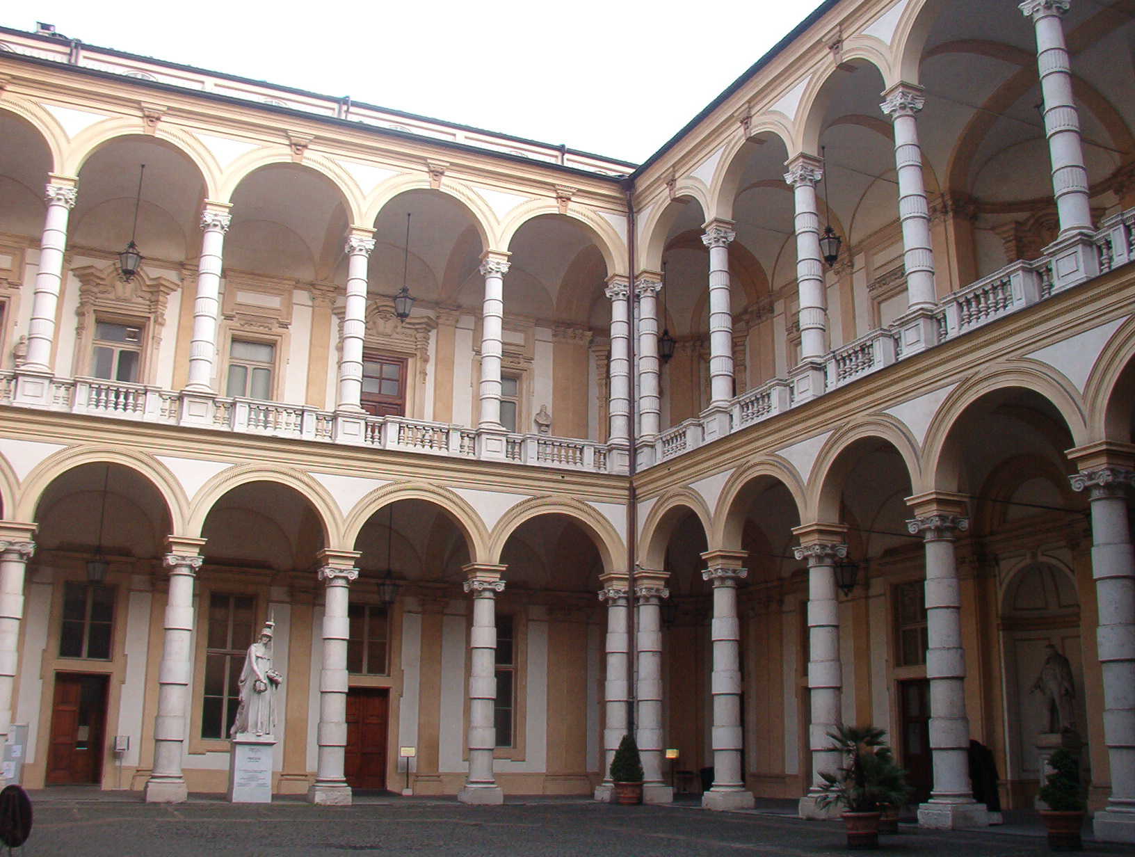 Palazzo dell'università - Cortile interno - Torino - Italia